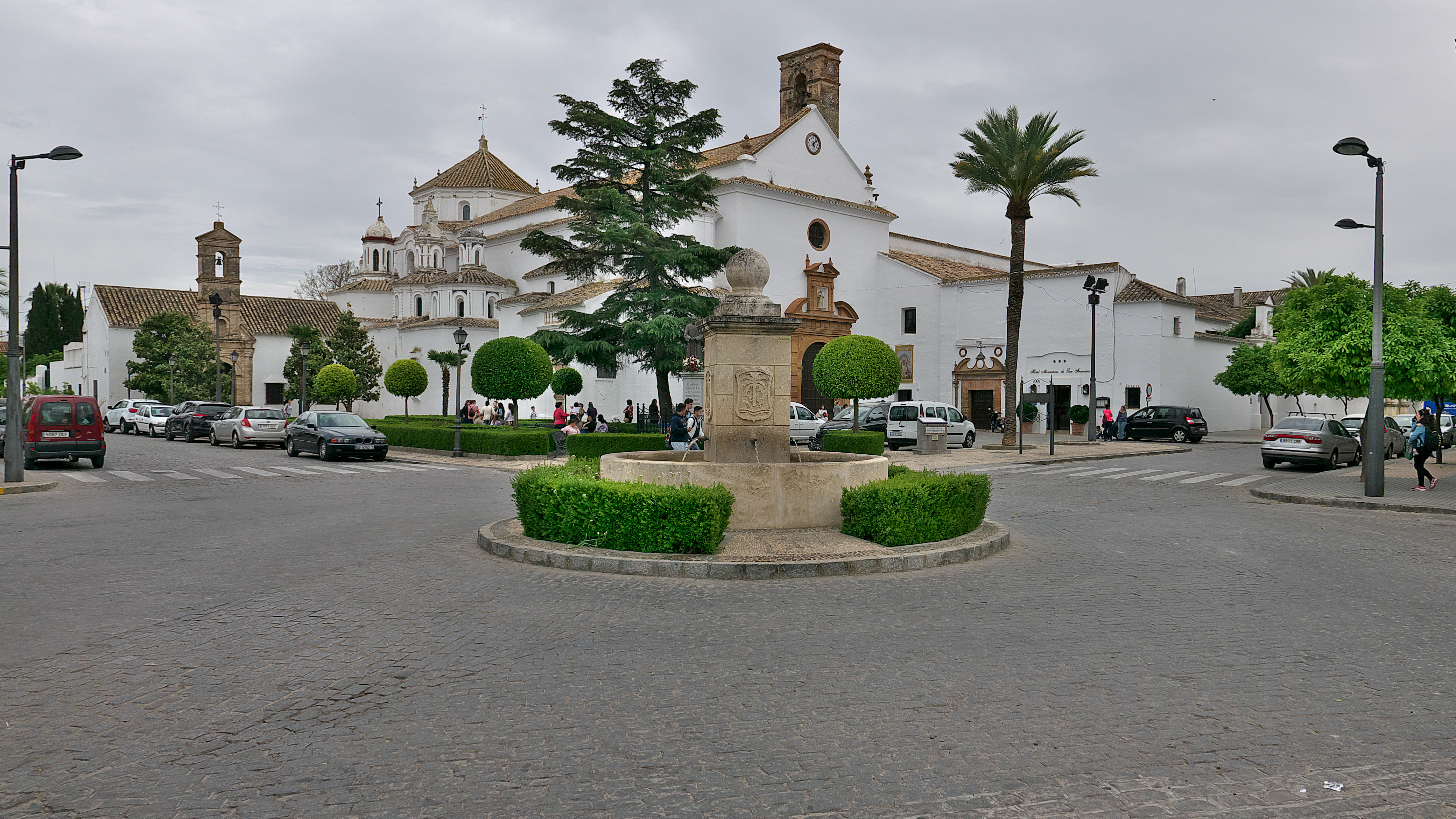 Convento franciscano promovido (1518) por Luis Fernández Portocarrero y Bocanegra, y Leonor de la Vega y Girón, condes de Palma del Río.